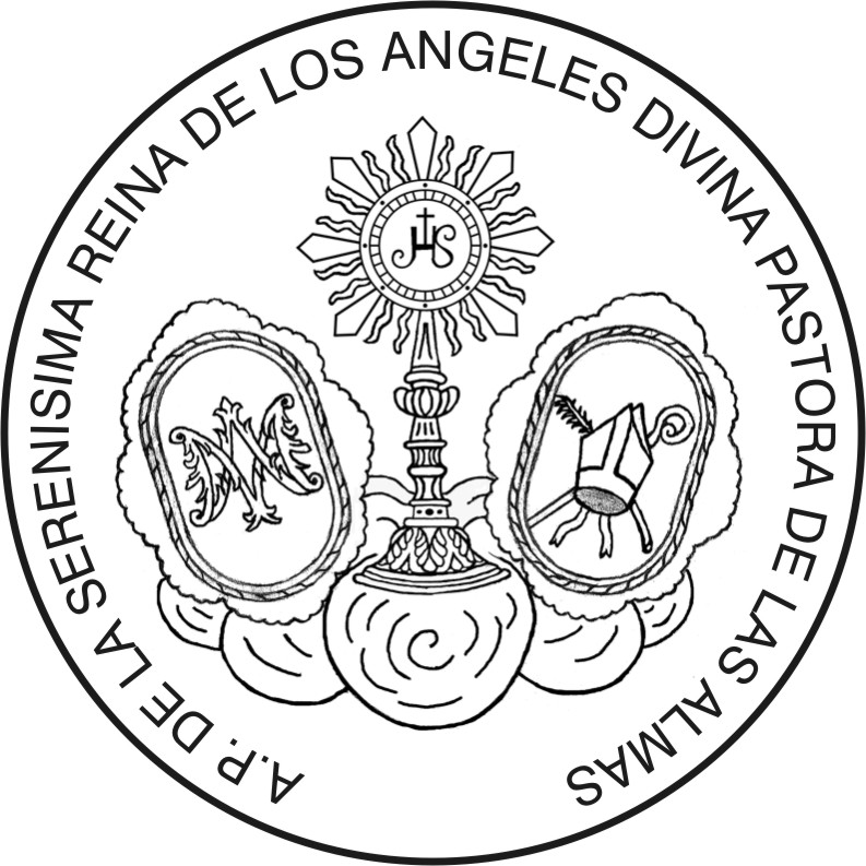 Escudo